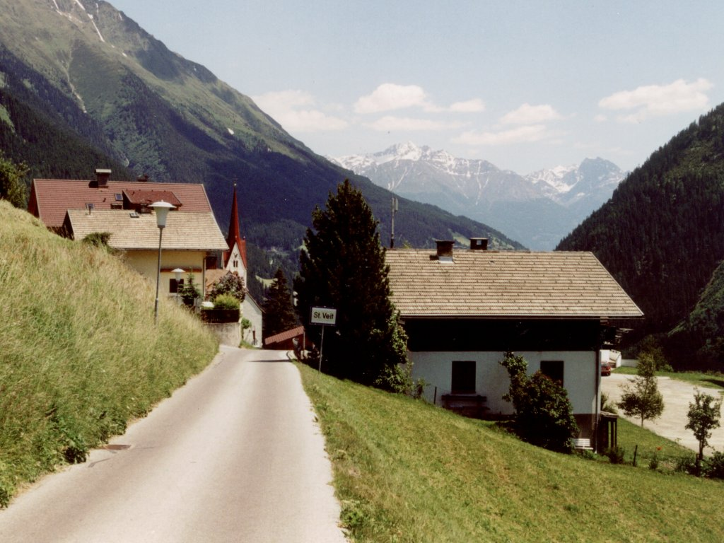 Ortseingang von St. Veit in Defereggen